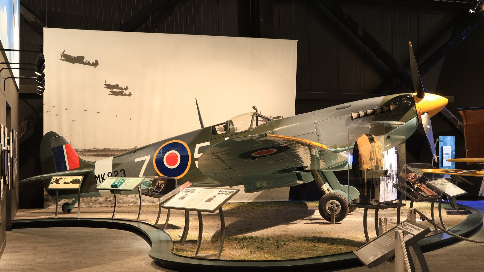 Supermarine / Spitfire Mk.IX / N521R号機 / Museum of Flight 所蔵 / 2015年9月19日撮影